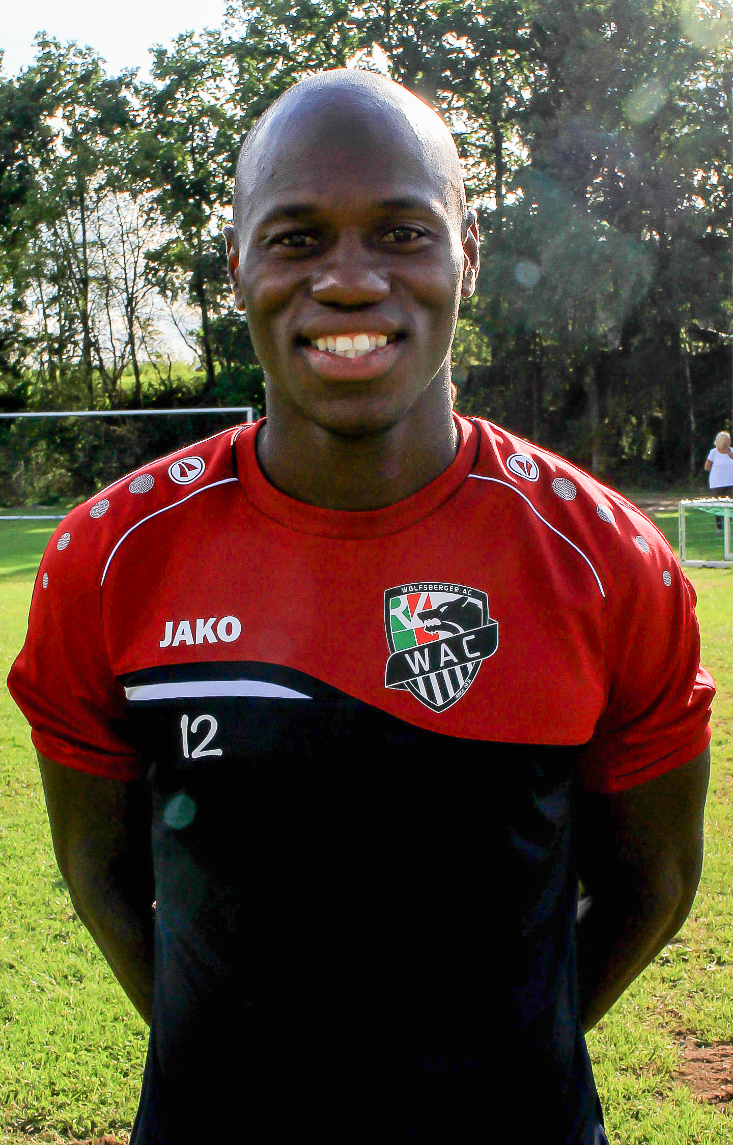 Dever Orgill (WAC)